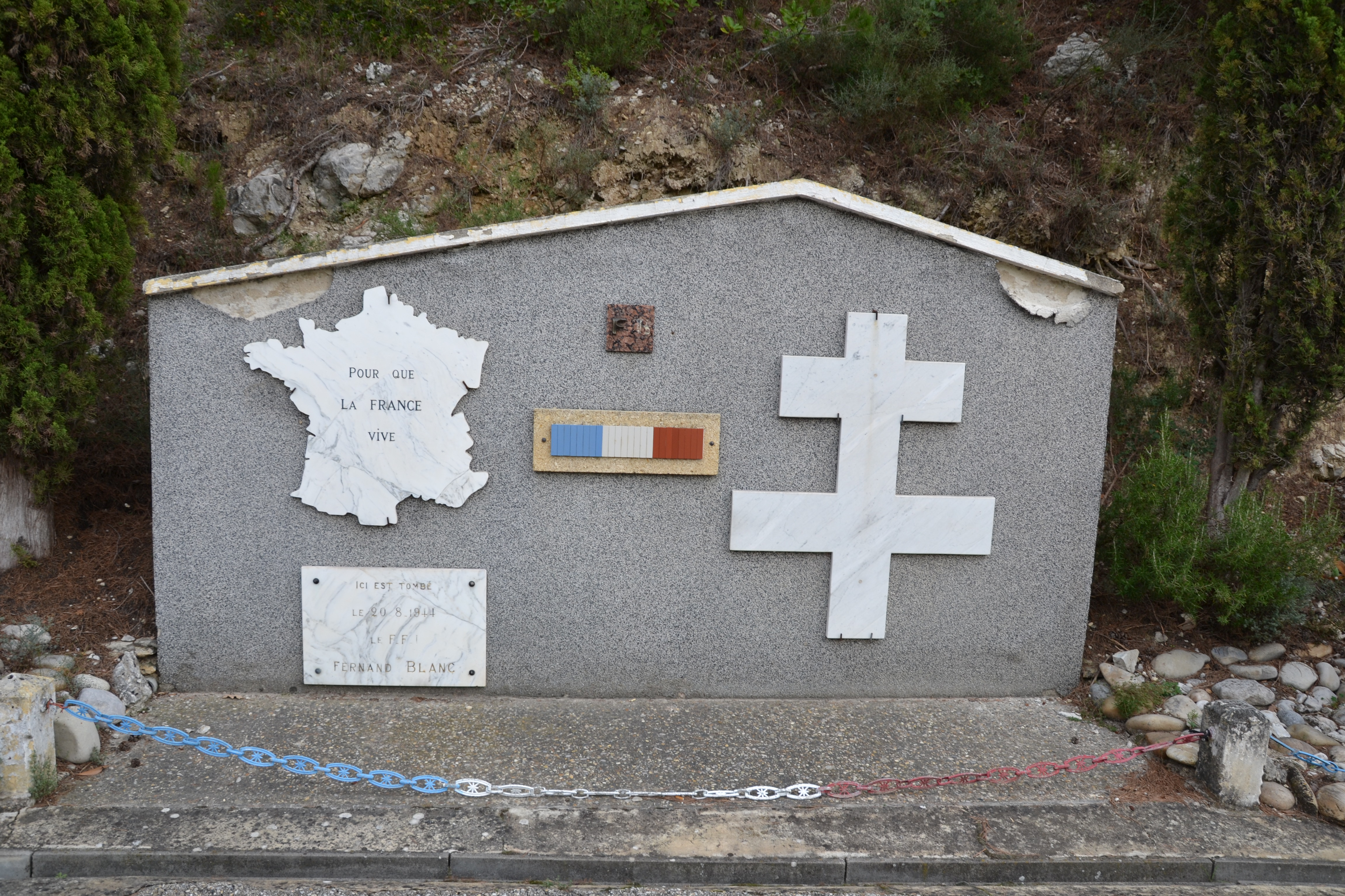 Stèle commémorative du Maquis Vasio (1944)